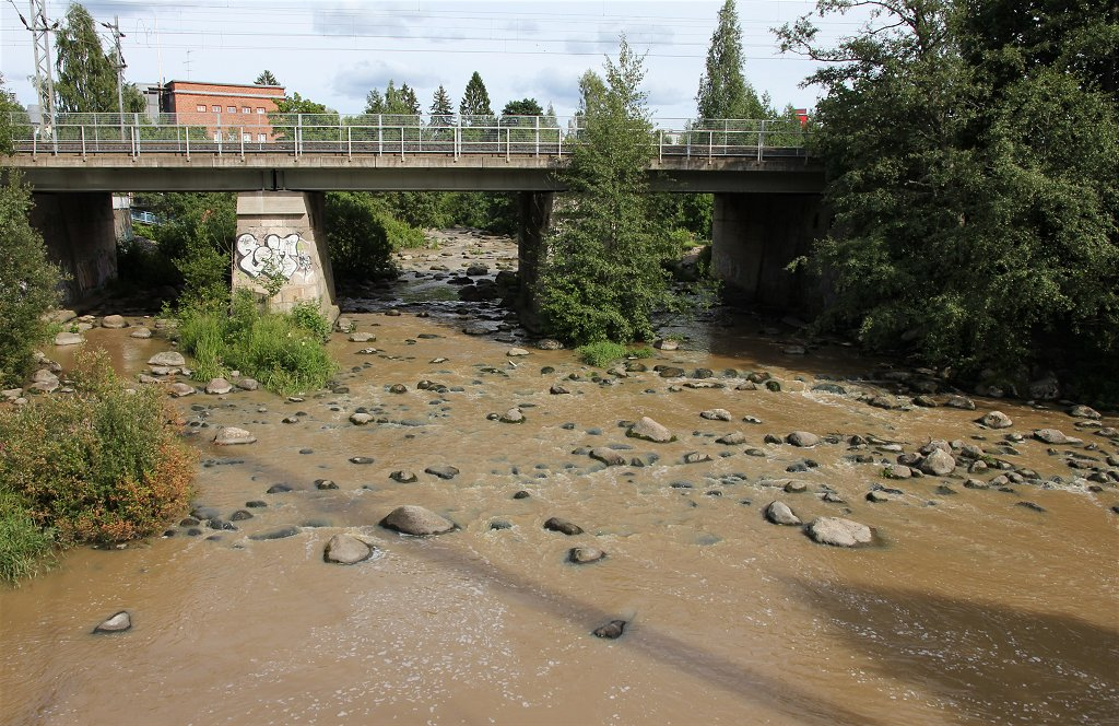 Keravanjoen Tikkurilankosken alajuoksua Vantaan Tikkurilan suuralueella. Koski sijaitsee pääosin Jokiniemen ja Kuninkaalan kaupunginosien välillä (näkyy pieneltä osin kuvan yläosassa, Pääradan itäpuolella) mutta aivan kosken alajuoksu (kuvan etualalla oleva, radasta länteen sijaitseva osa) on Tikkurilassa.